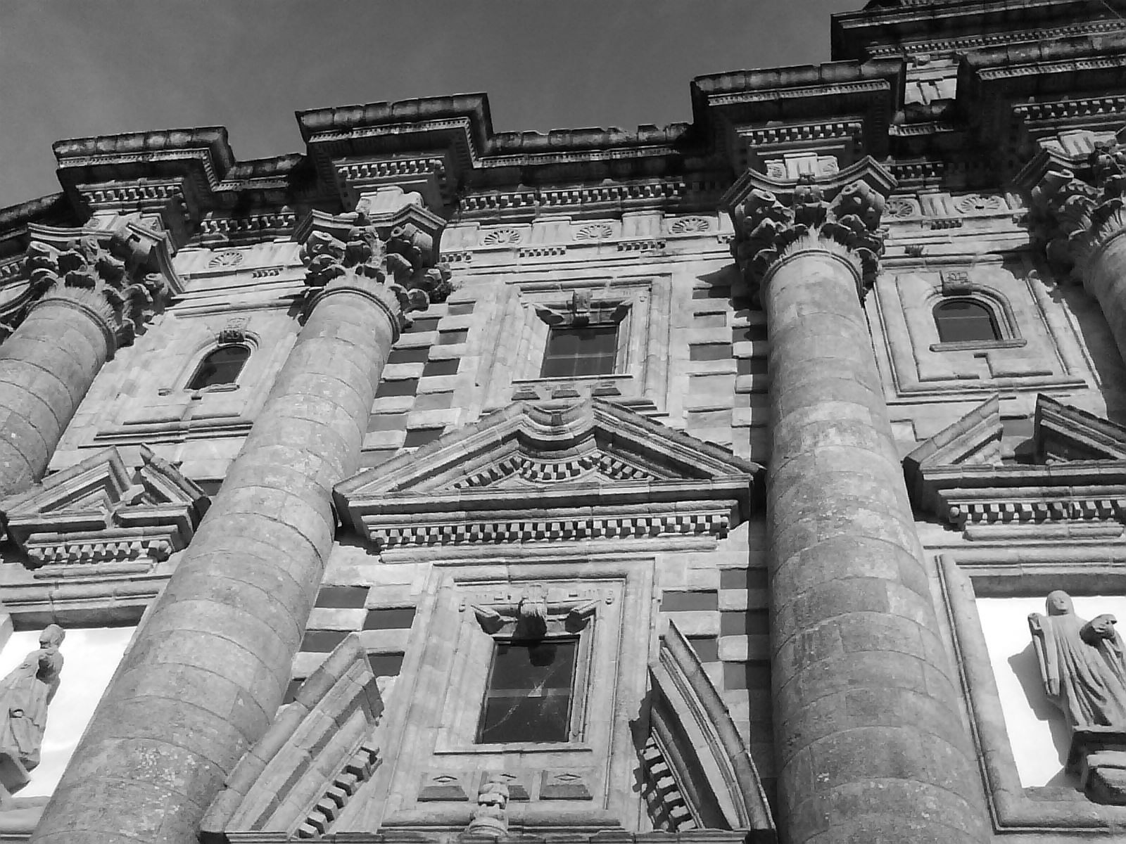 Mosteiro de Monfero, Galicia'448137614_8fddbe5b72_b.jpg'